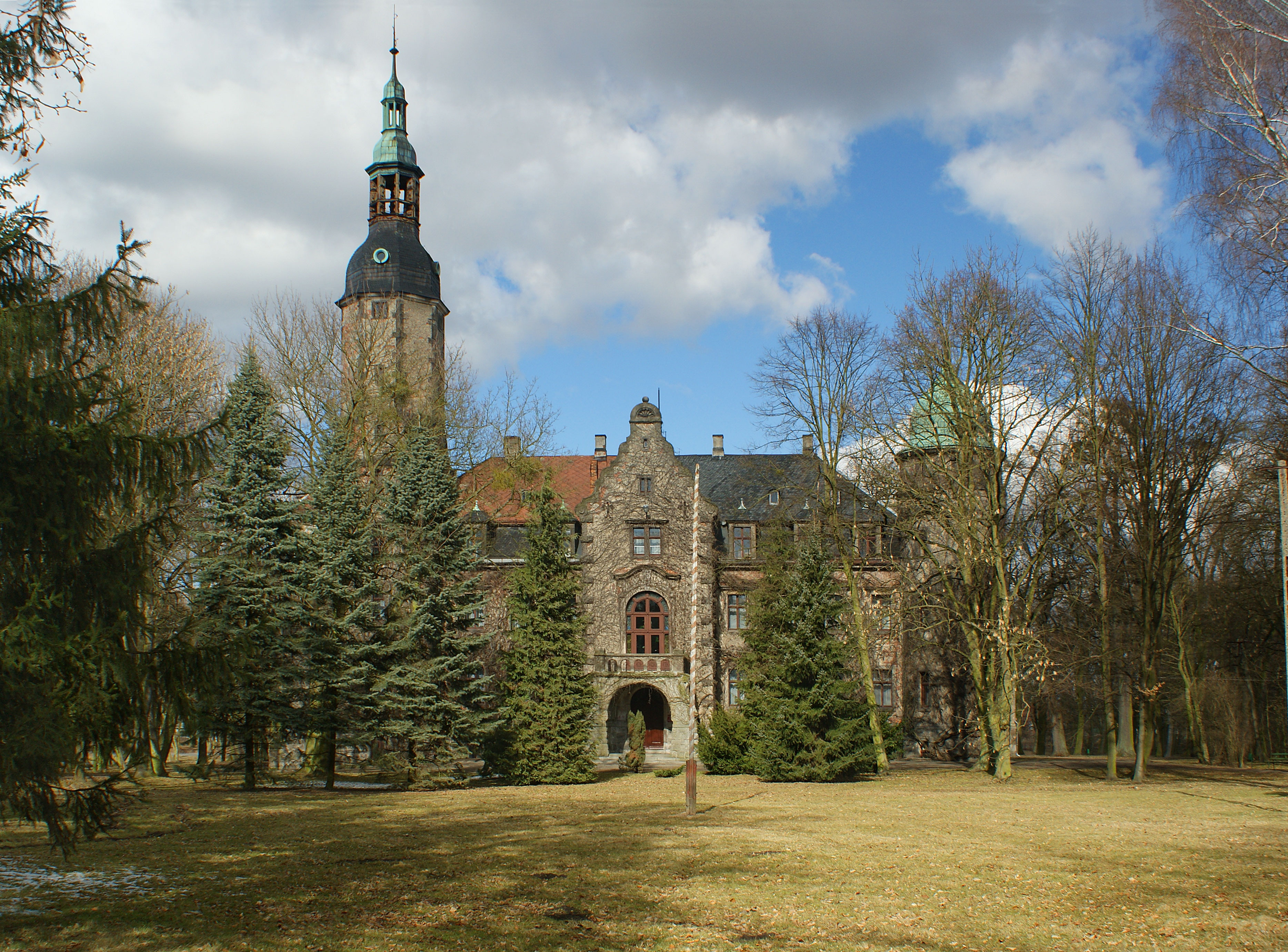 Sobótka - zespół pałacowy: eklektyczny pałac Von Stieglerów z lat 1898-1899 (zabytek nr 1411/A)